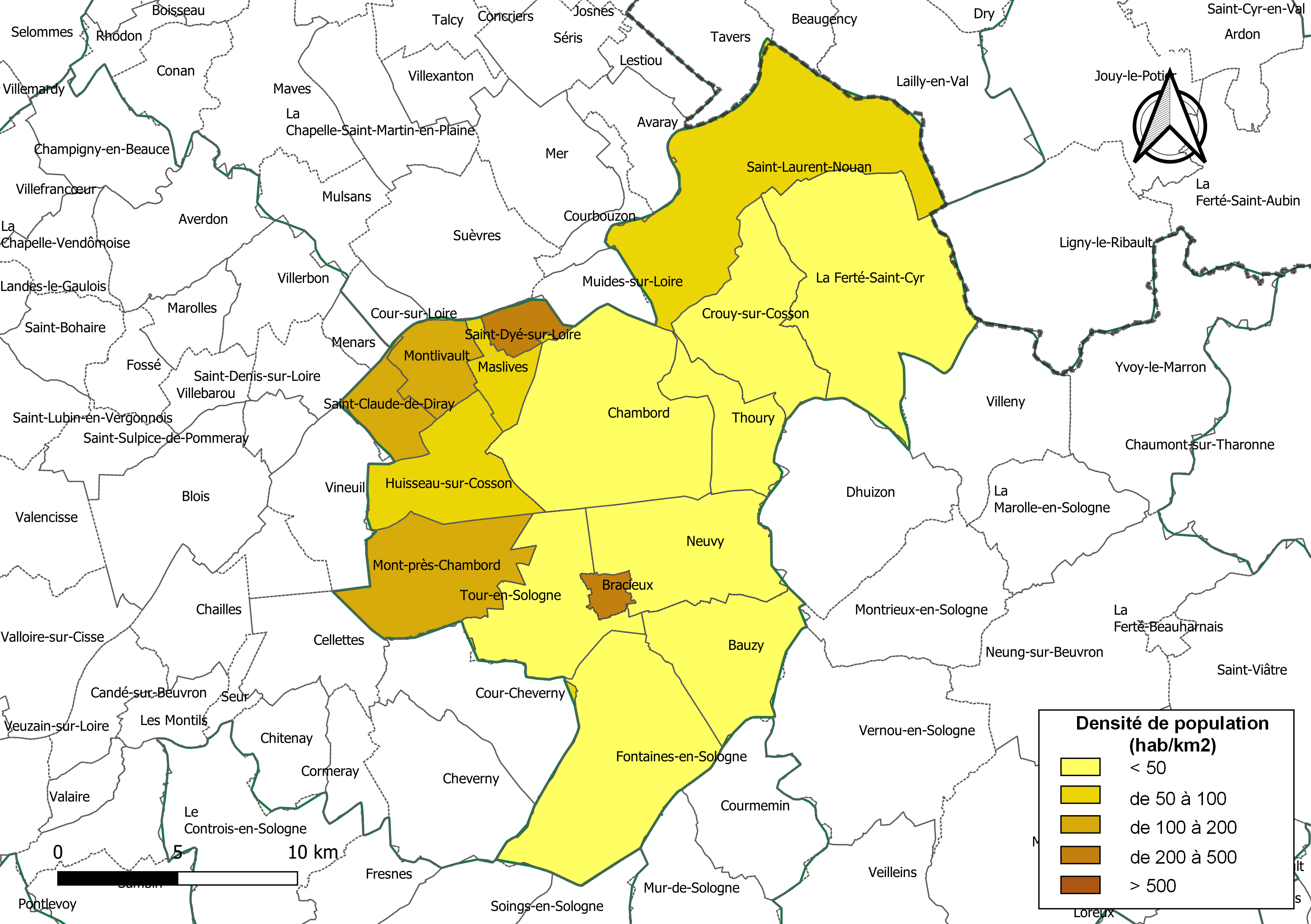 Carte des densités de population (millésimée 2016) des communes de la communauté de communes la Communauté de communes du Grand Chambord, département de Loir-et-Cher, France. Composition au 1er janvier 2019.